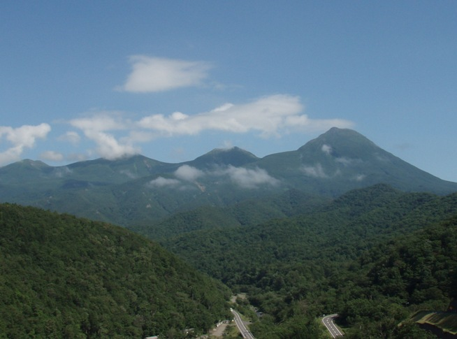 Stratovolcano Rausu in Hokkaido.